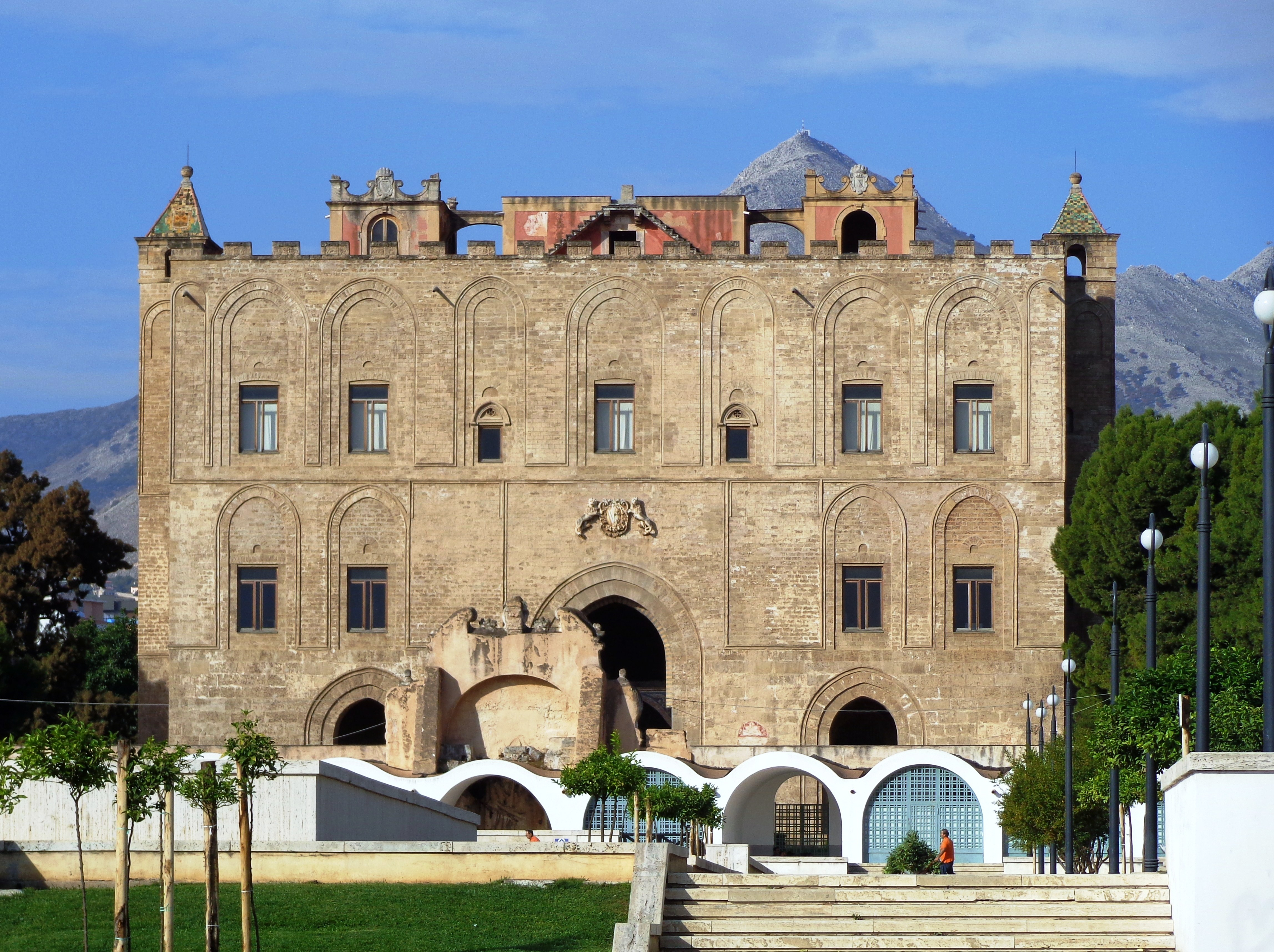 Palazzo Zisa PA 03